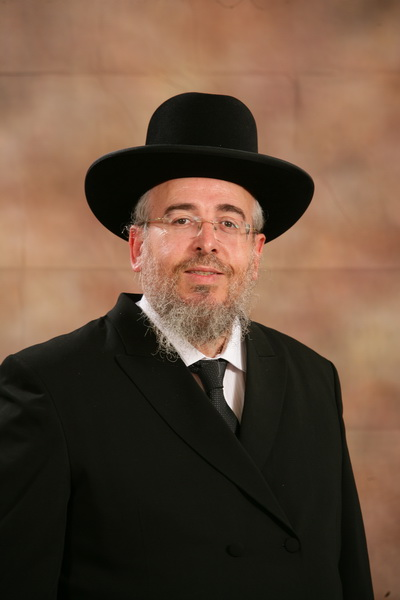 הרב ארי אברהם סמג'ה